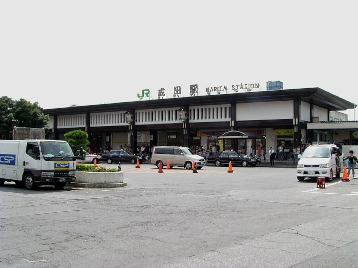 2005年7月10日に投稿者が成田駅にて撮影。